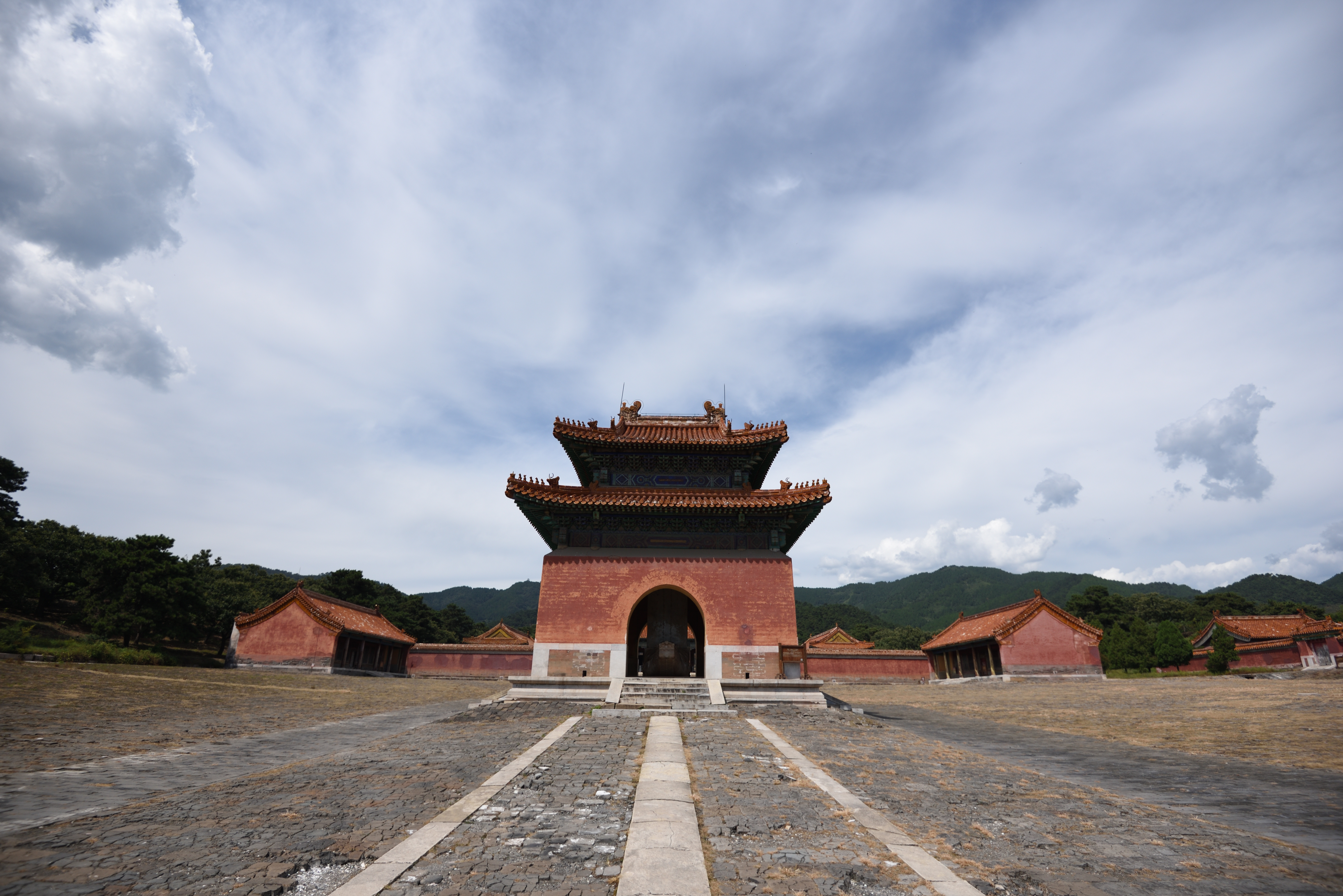 清孝陵（顺治墓）